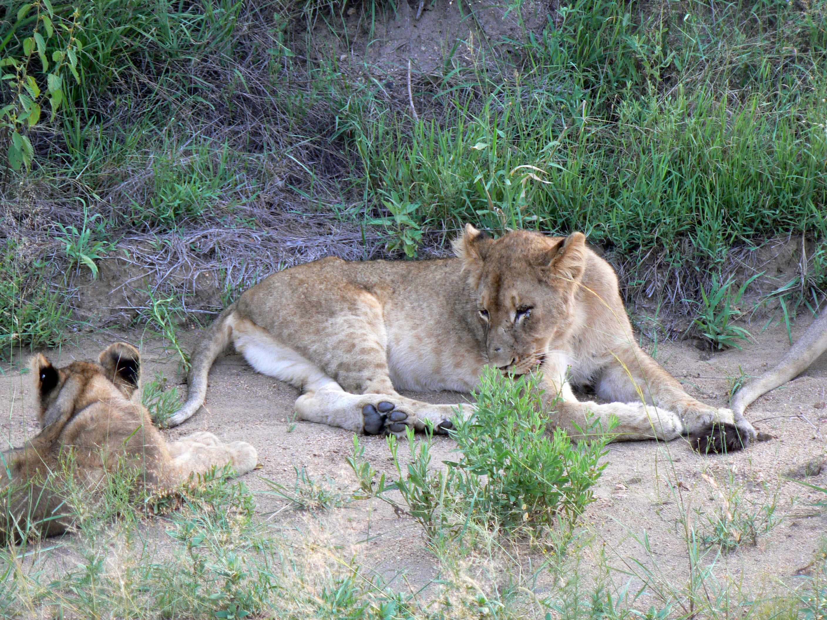 Just checking